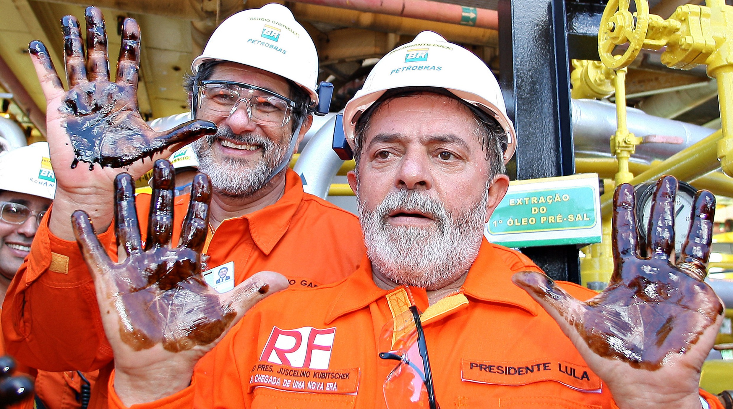 O Presidente do Brasil Lula e o presidente da Petrobras, Sergio Gabrielli, com óleo extraído da camada pré-sal nas mãos Foto